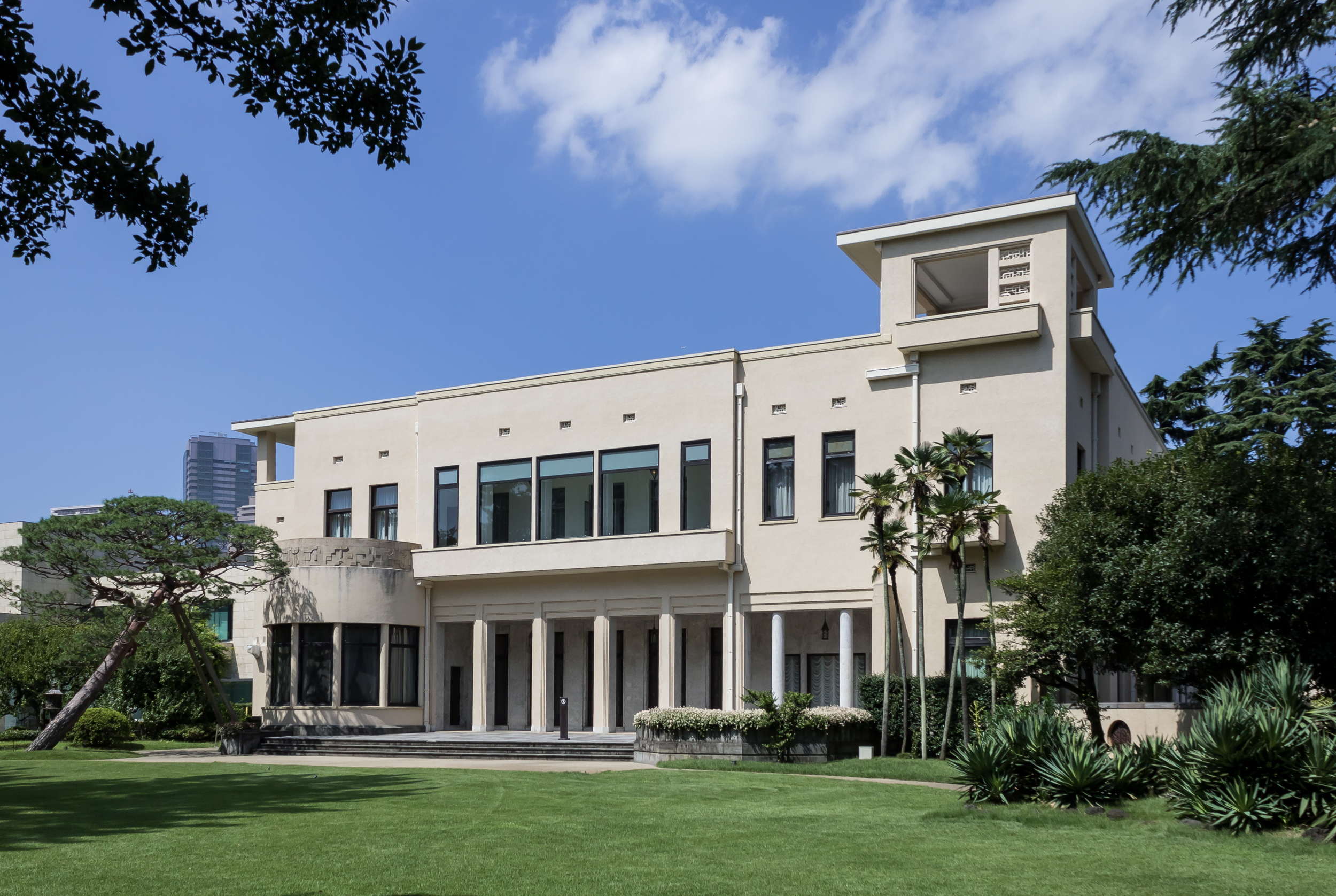 東京都庭園美術館(旧朝香宮鳩彦王邸宅)、重要文化財。東京都港区。